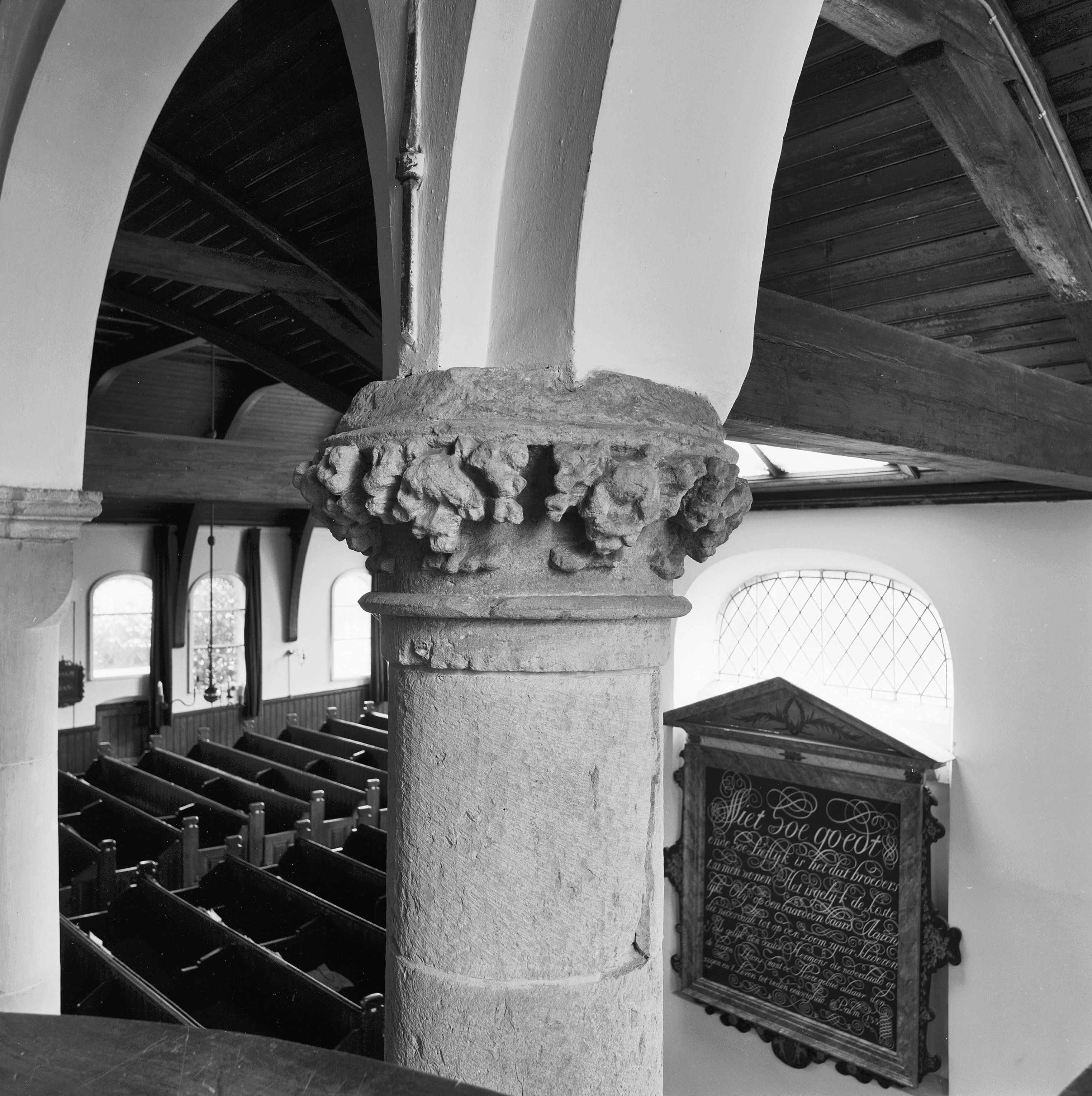 Nederlands Hervormde Kerk en Toren: interieur, detail kolom